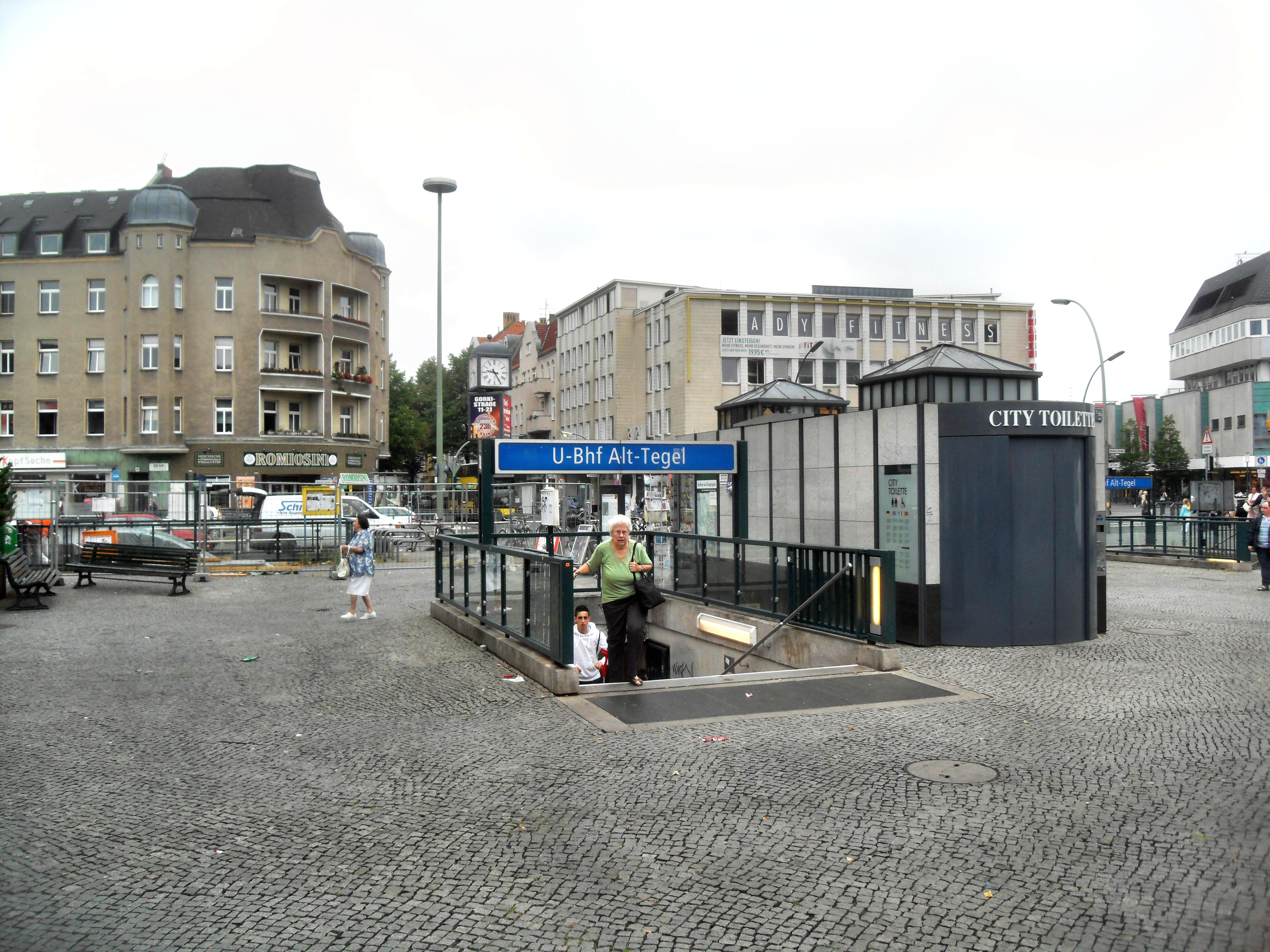 Nordwestlicher Eingang des U-Bahnhofes Alt-Tegel in Berlin (Deutschland)